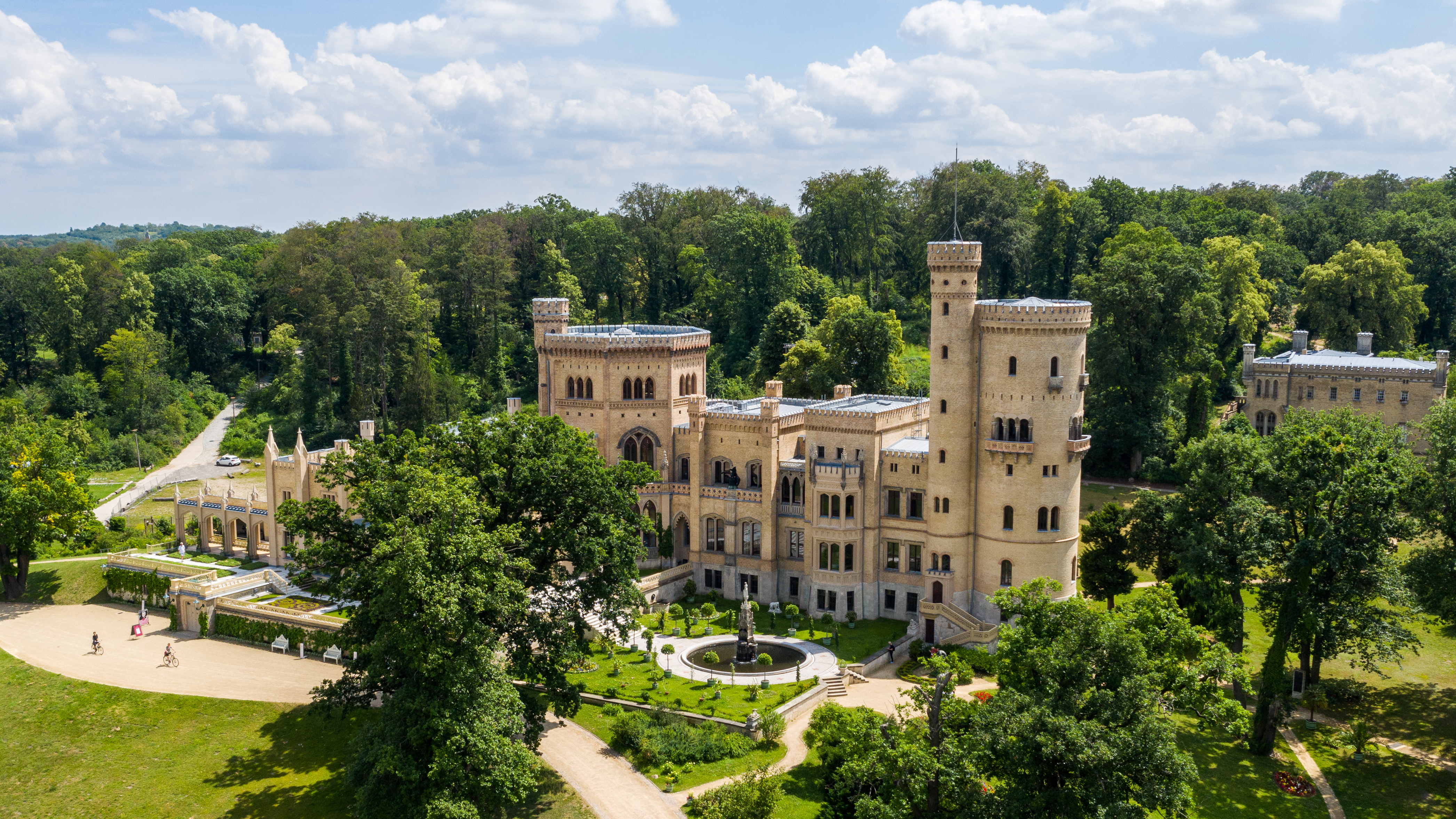 Schloss Babelsberg - Luftaufnahme